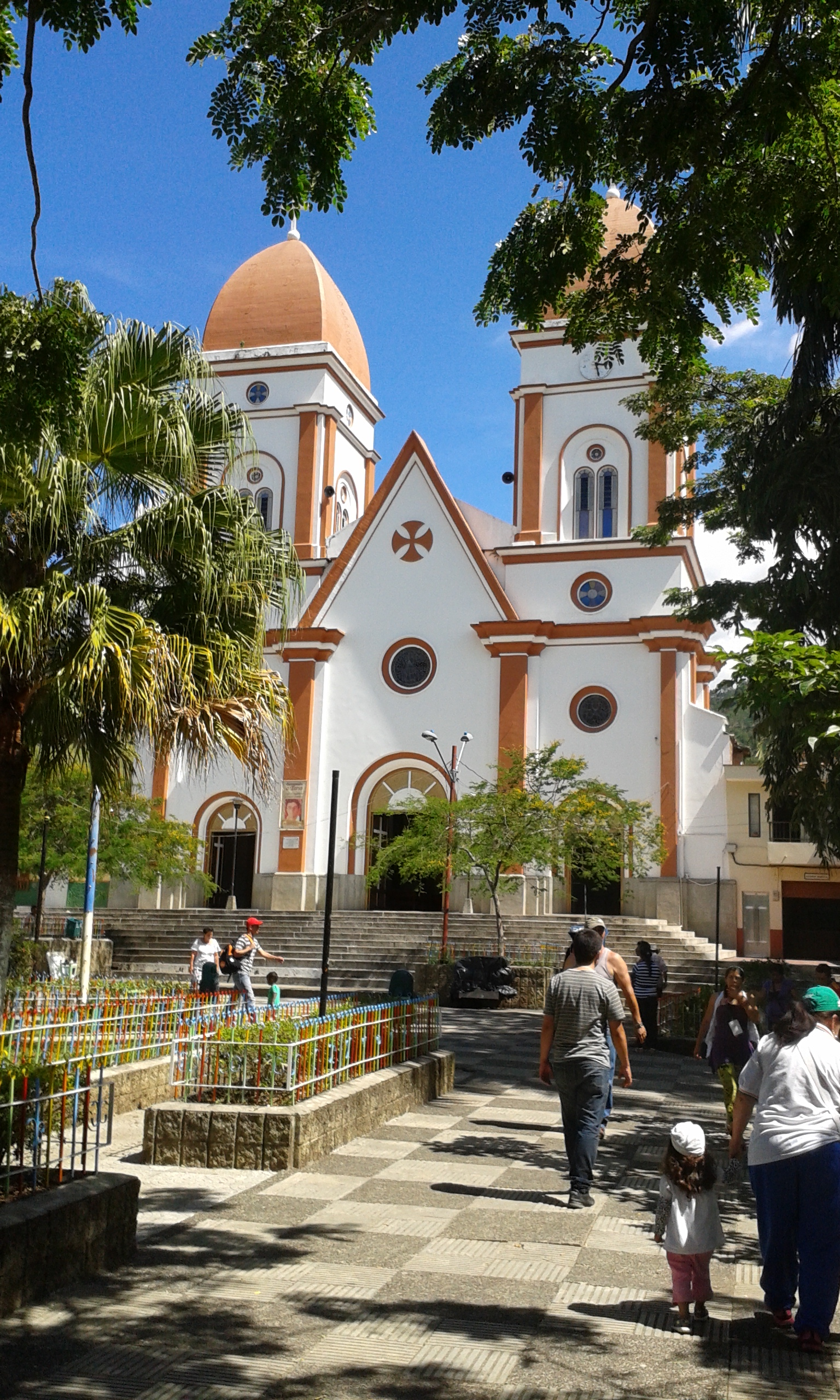 Parque central Tarso Antioquia, Colombia